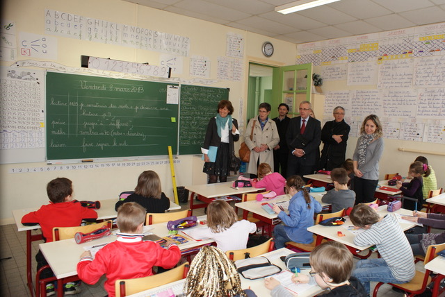 Visite du recteur de l'académie de Rouen, Claudine Schmidt-Laine, de l'école primaire de Conche en Ouche en 2014.